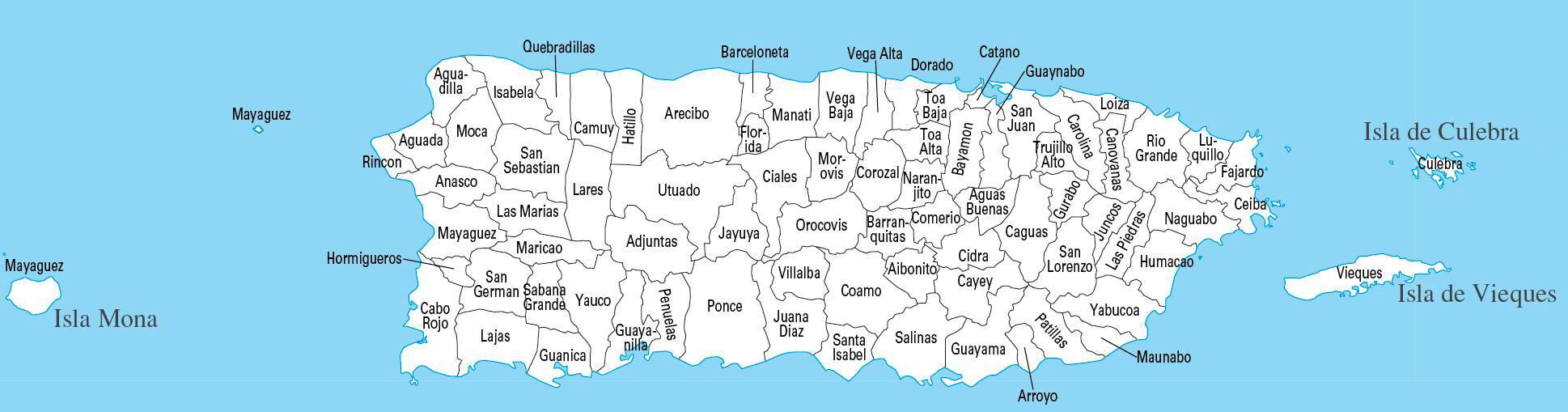 PR Municipalities